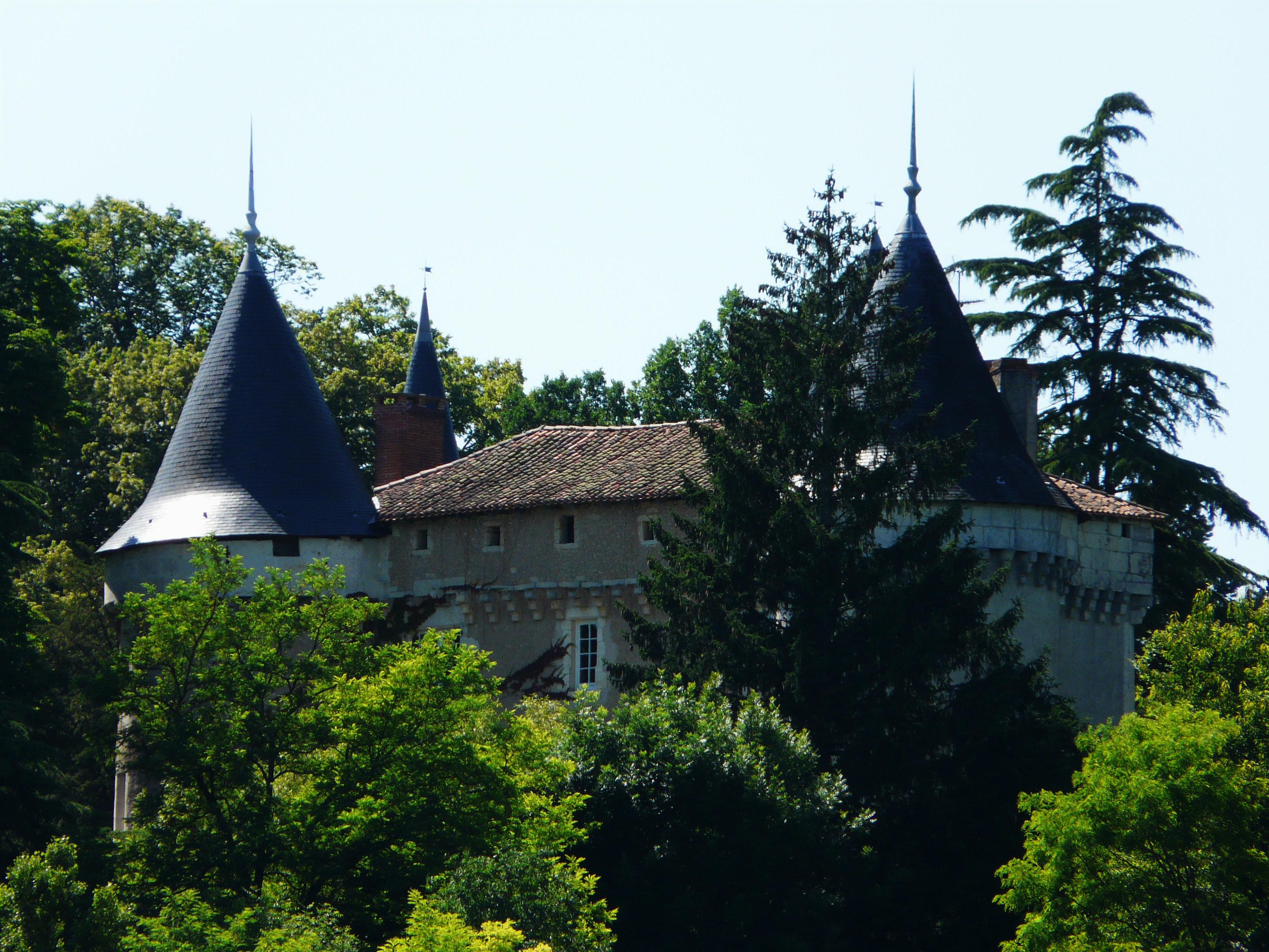 Le château de Trigonant à Antonne-et-Trigonant, Dordogne, France